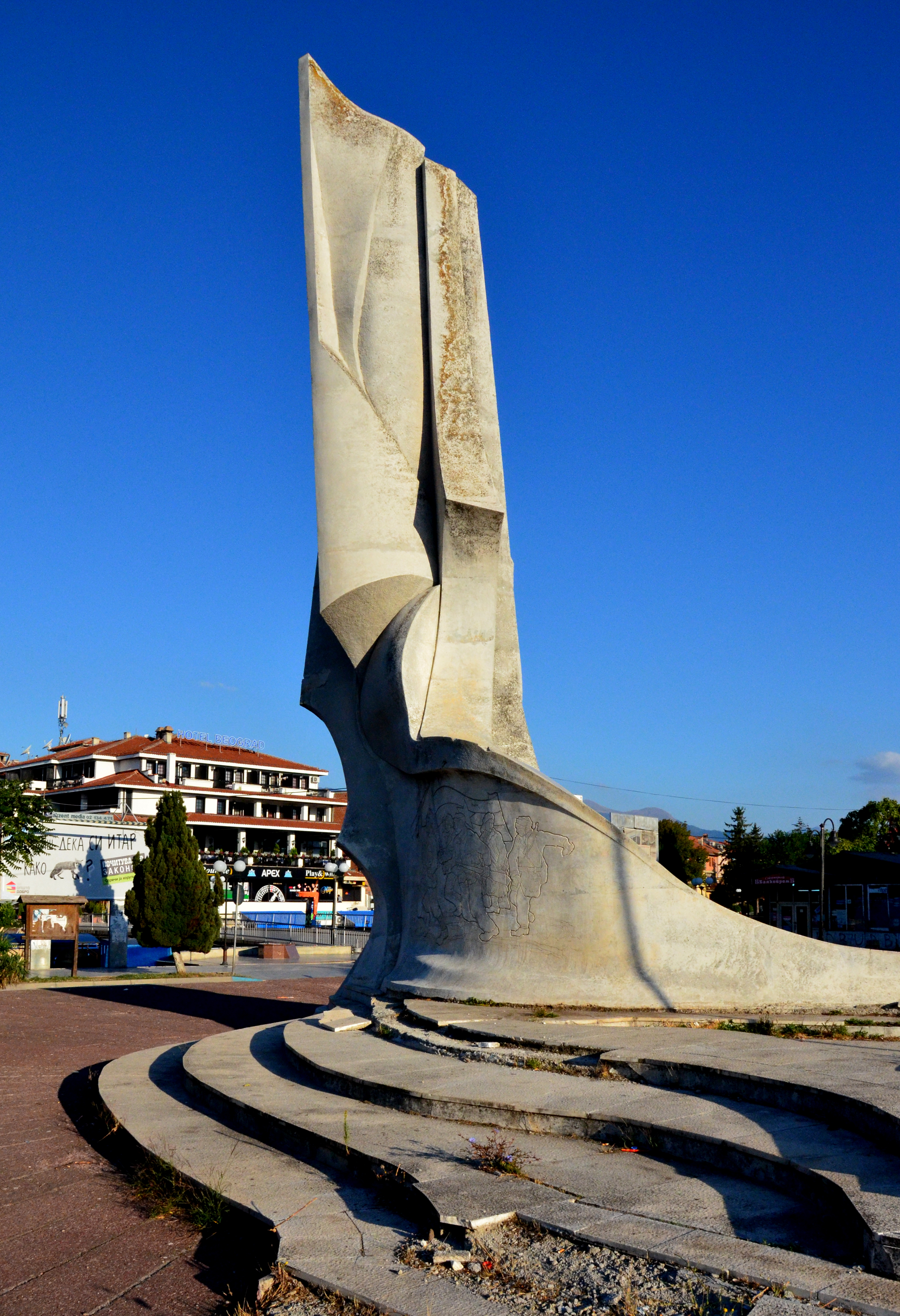 Струга